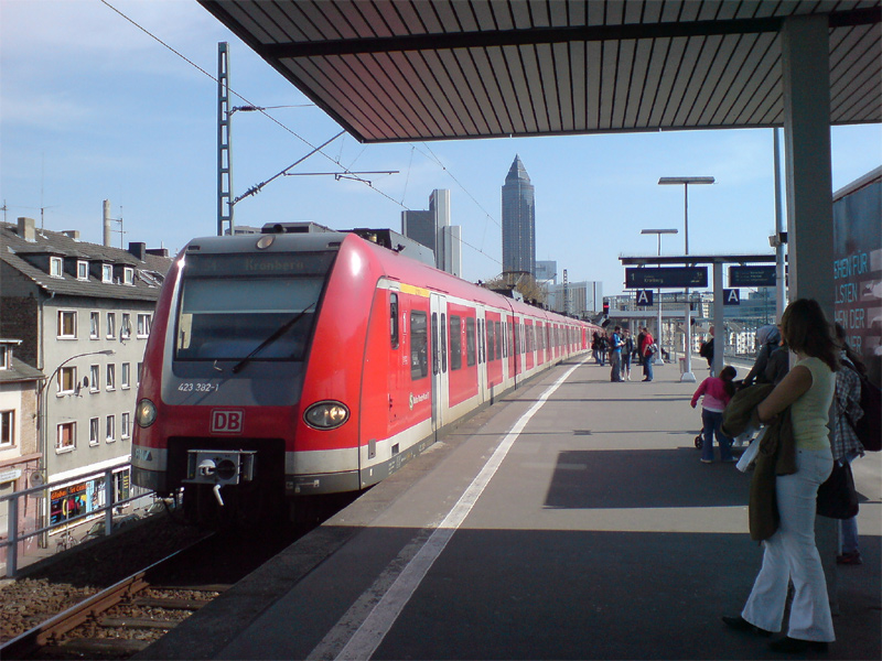 Frankfurt am Main - Westbahnhof, Gleis 1, ET 423, Linie S4